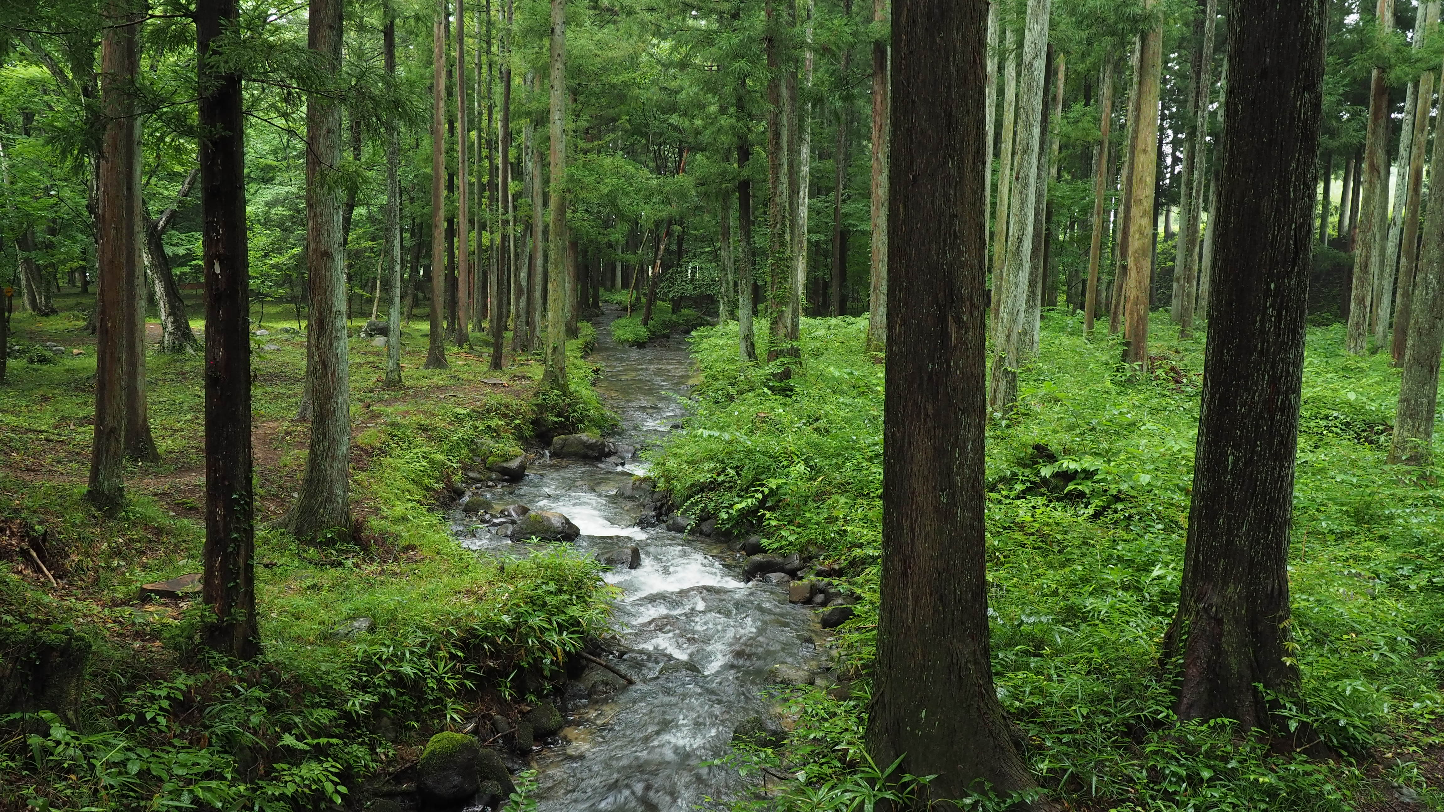 福島県荒川右岸の自然林。2020年8月撮影。